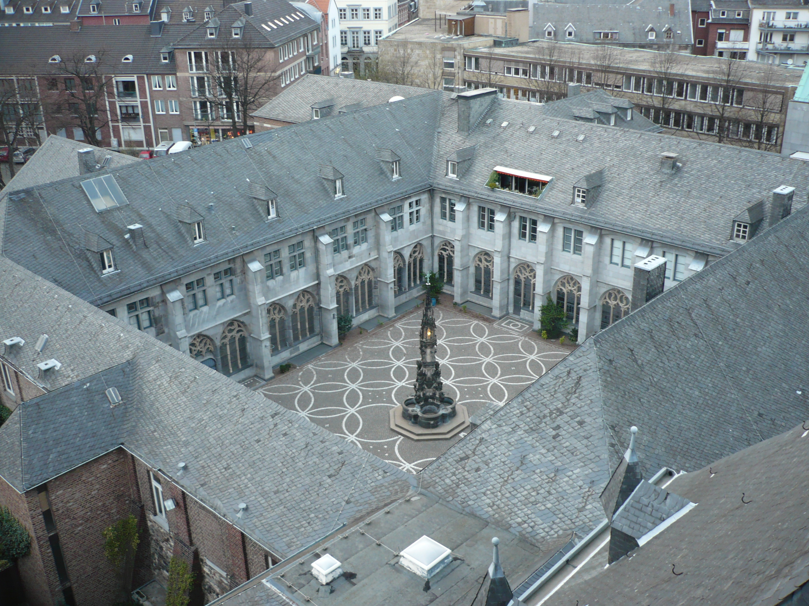 Kreuzgang des Aachener Doms mit Paradiesbrunnen im Atrium